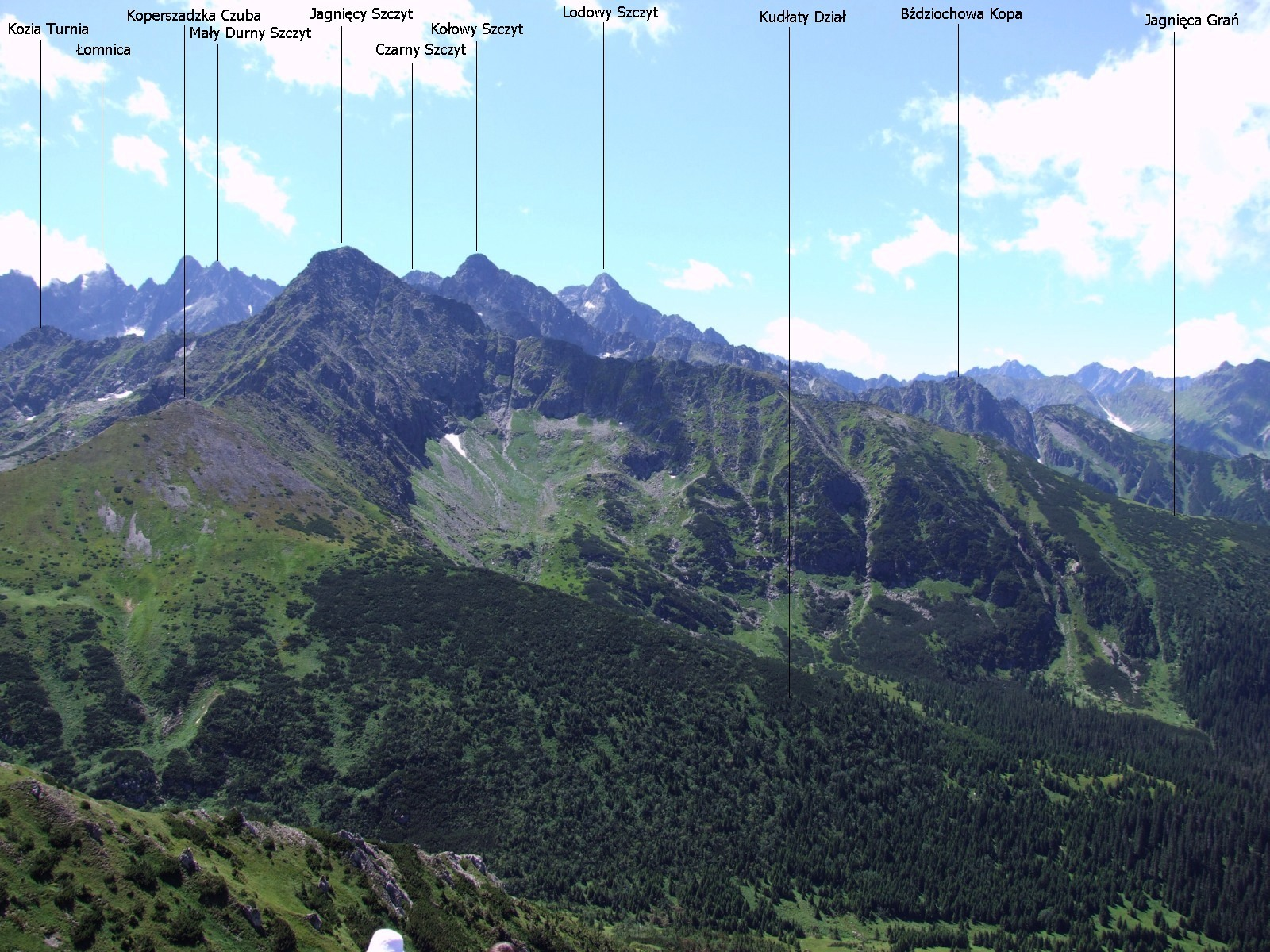 Widok z Szerokiej Przełęczy w Tatrach Bielskich na południe